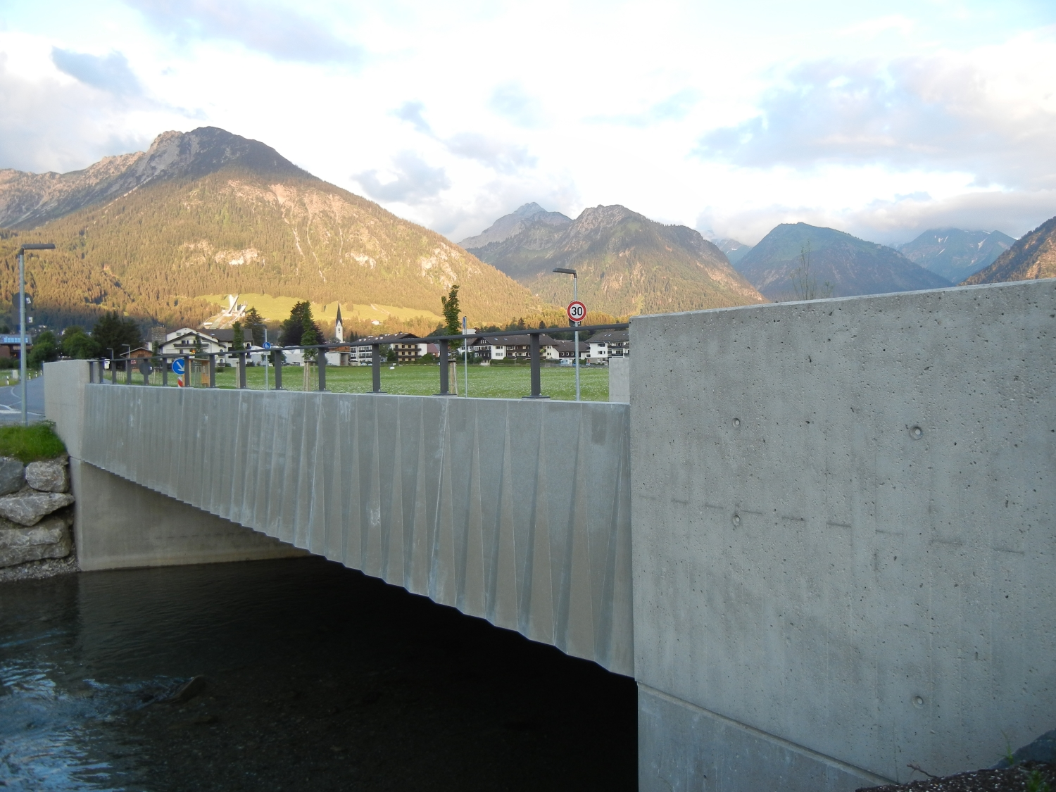 Zur Erhöhung der Widerstandsfähigkeit gegen Umweltbedingungen sowie Abrieb und Stoßbelastung wurden die Brüstungen mit Fertigteilen aus UHPC erstellt.